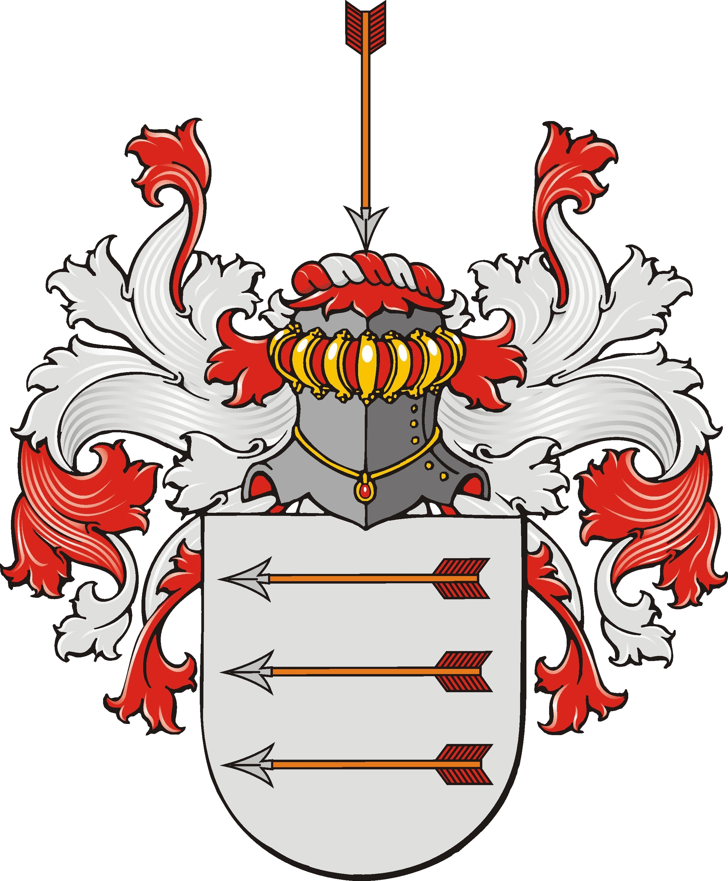 Wapen: in zilver drie gewende rood gevederde pijlen van natuurlijke kleur, boven elkaar. Helmteken: een omgekeerde pijl. Dekkleden: rood, gevoerd van zilver.